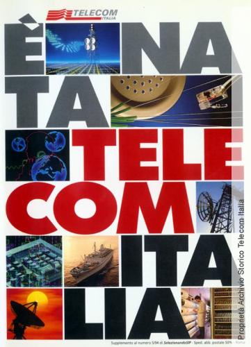 La nascita di Telecom Italia annunciata su un opuscolo aziendale